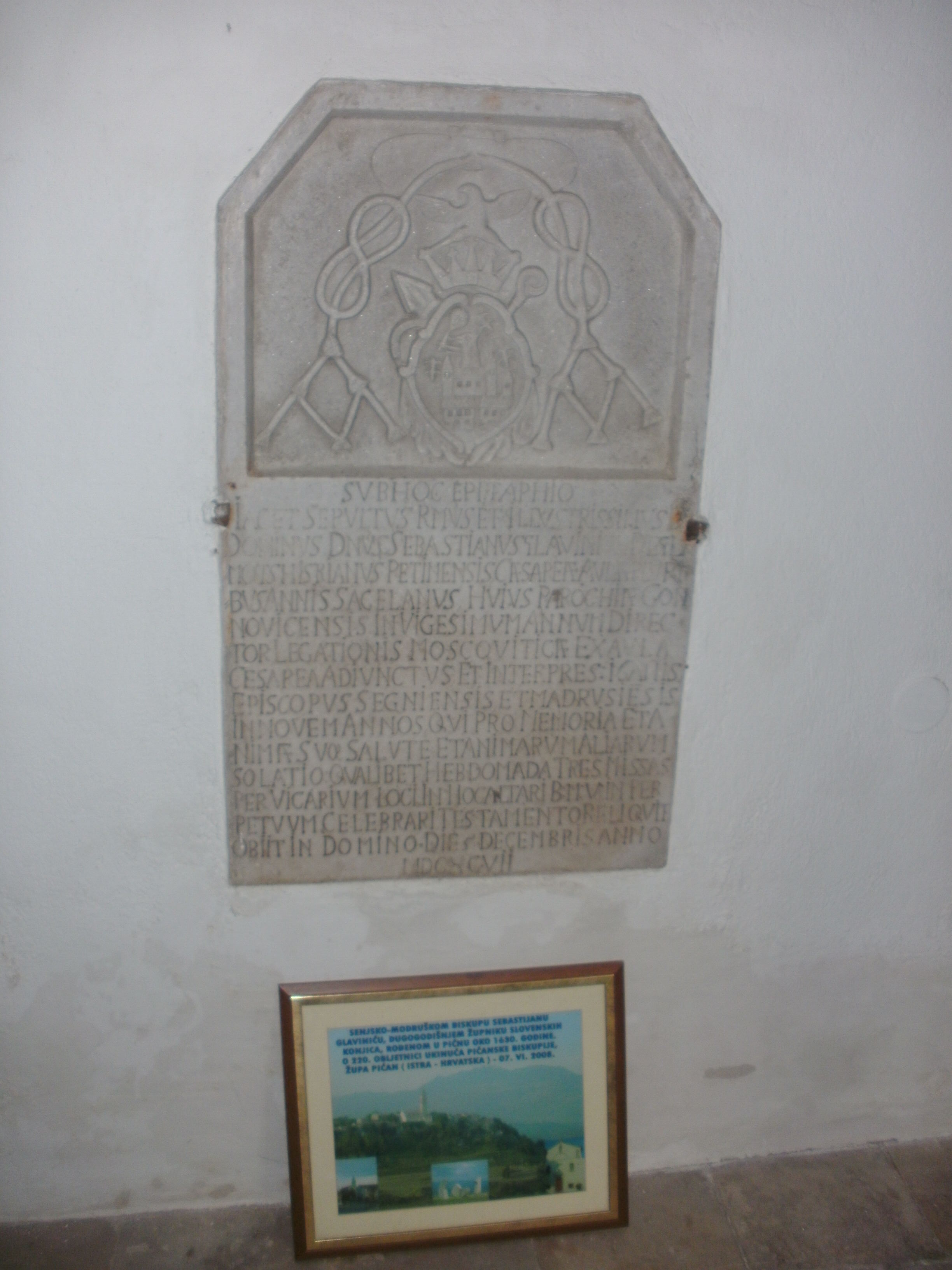 nagrobnik Boštjana Glavinića de Glamoć, škofa v SenjuUnknownUnknown sebastian glavinić de glamoć's tomb stone, bishof of senj